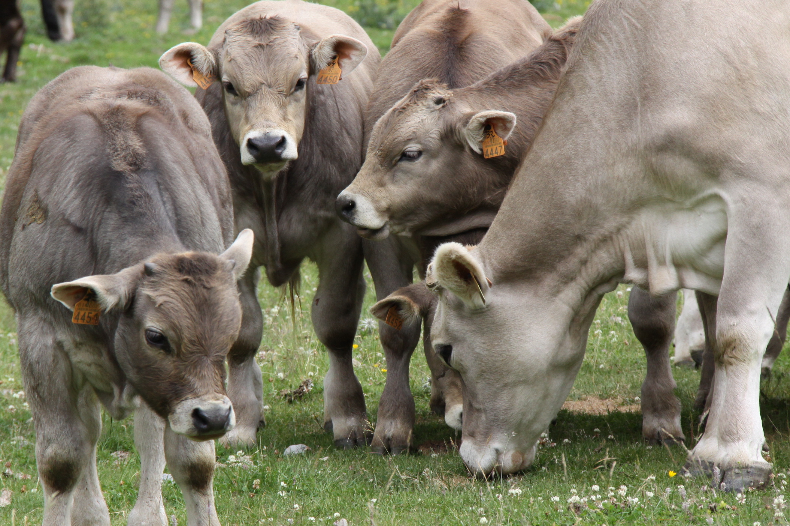 Vedelles pasturant a la Vall d'Ordesa (Pirineu Aragonès) - juliol 2011